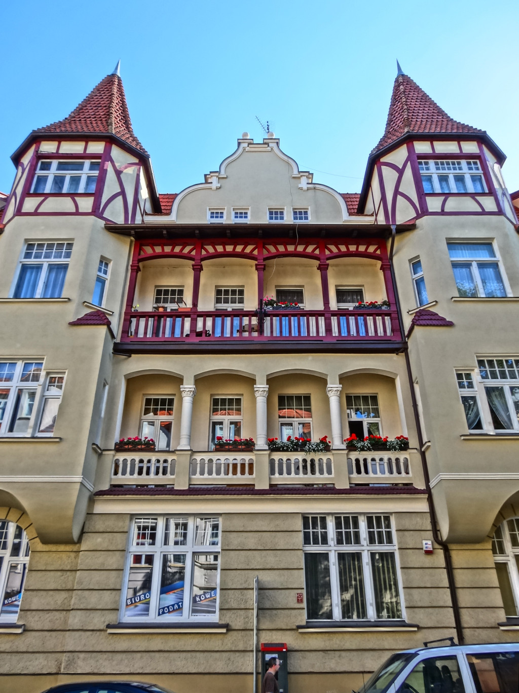 Kamienica przy ul. Cieszkowskiego 13-15 w Bydgoszczy (1902-1903 Fritz Weidner)